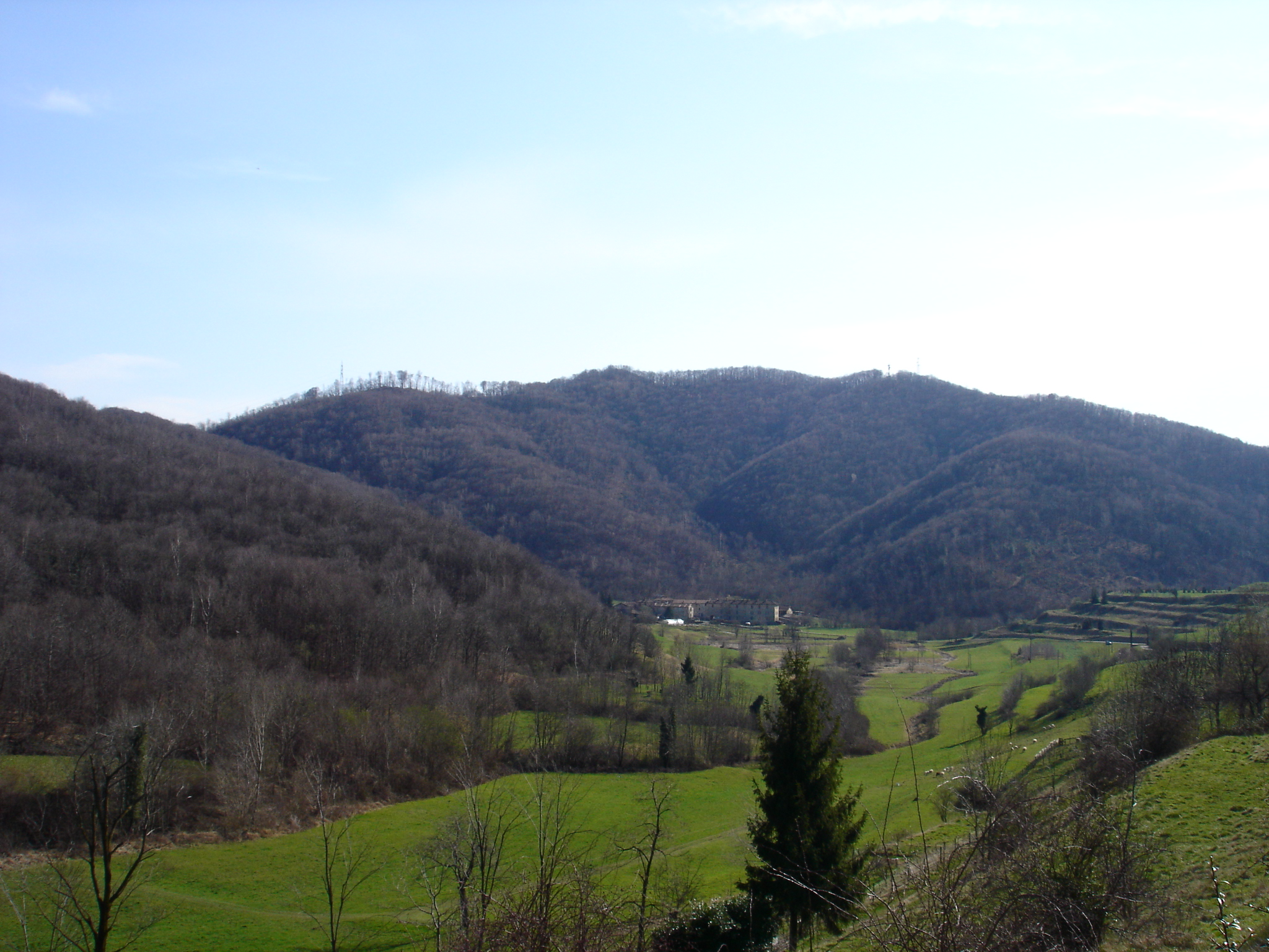 Monte Regina, near Lecco.